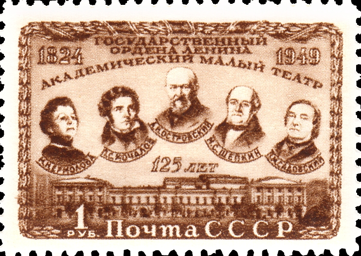 Драматург А. Н. Островский (1823-1886), актеры М. Н. Ермолова (1853-1928), П. С. Мочалов (1800-1848), М. С. Щепкин (1788-1863) и П. М. Садовский (1818-1872). Почтовая марка СССР 1949г.